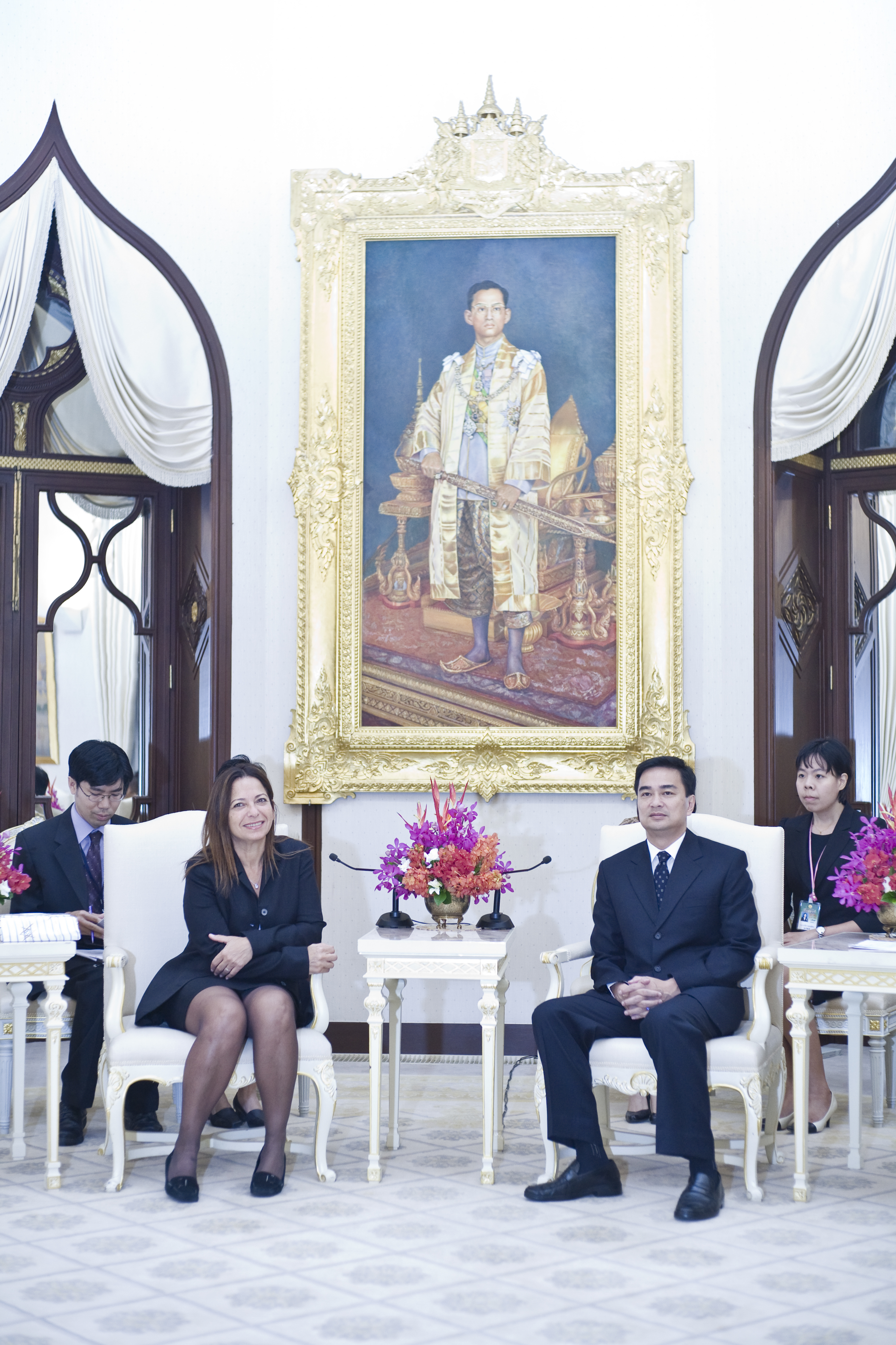 H.E.Mrs.Yael Rubinstein เอกอัครราชทูตรัฐอิสราเอลประจำประเทศไทย เข้าเยี่ยมคารวะนายกรัฐมนตรี เพื่ออำลาในโอกาสพ้นหน้าที่ ณ ห้องสีงาช้าง ตึกไทยคู่ฟ้า ทำเนียบรัฐบาล 6สิงหาคม2552 (The Official Site of The Prime Minister of Thailand Photo by พีรพัฒน์ วิมลรังครัตน์)